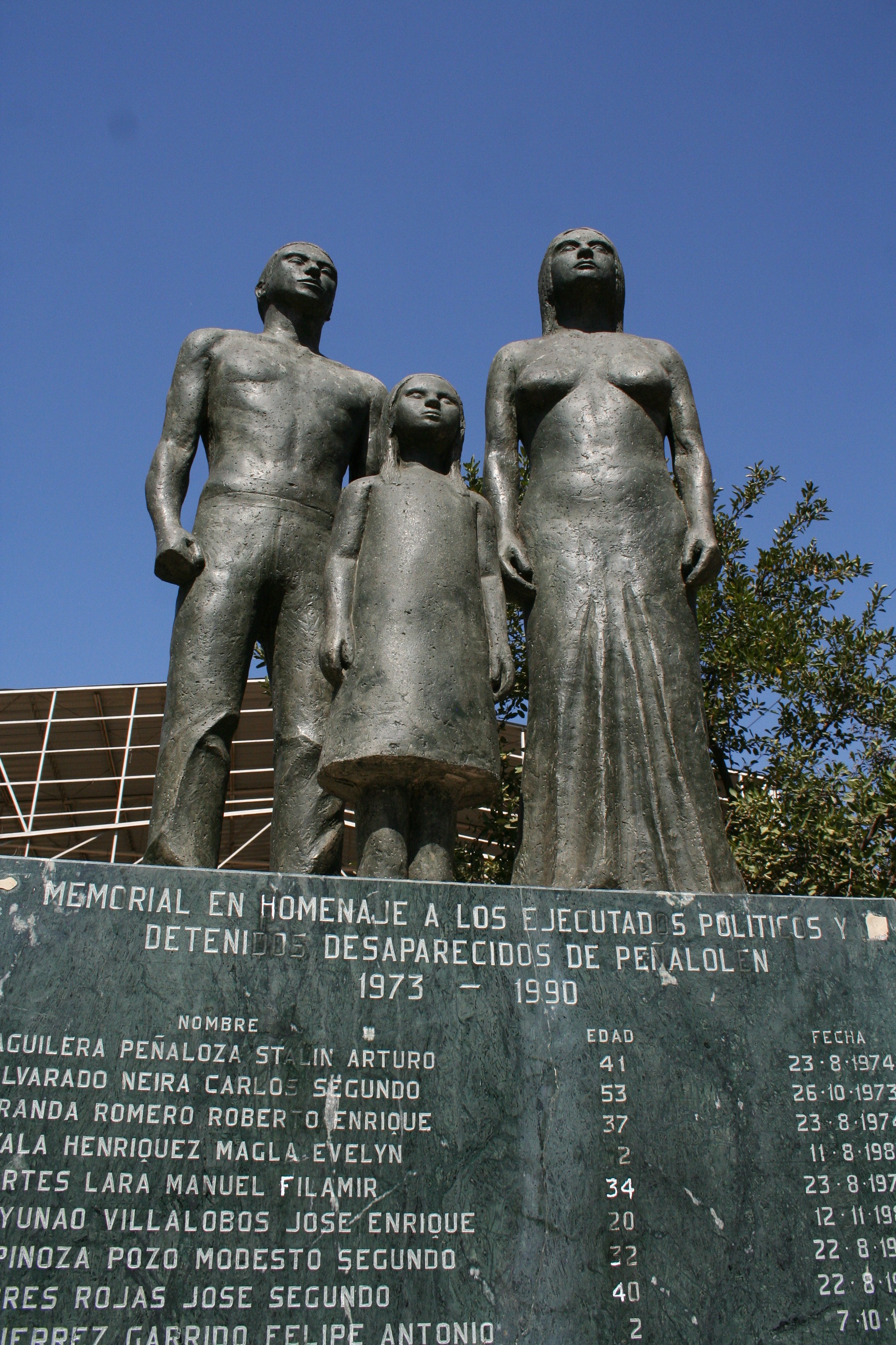 Memorial conmemorativo de la violación de los DDHH en Chile durante el régimen de Pinochet